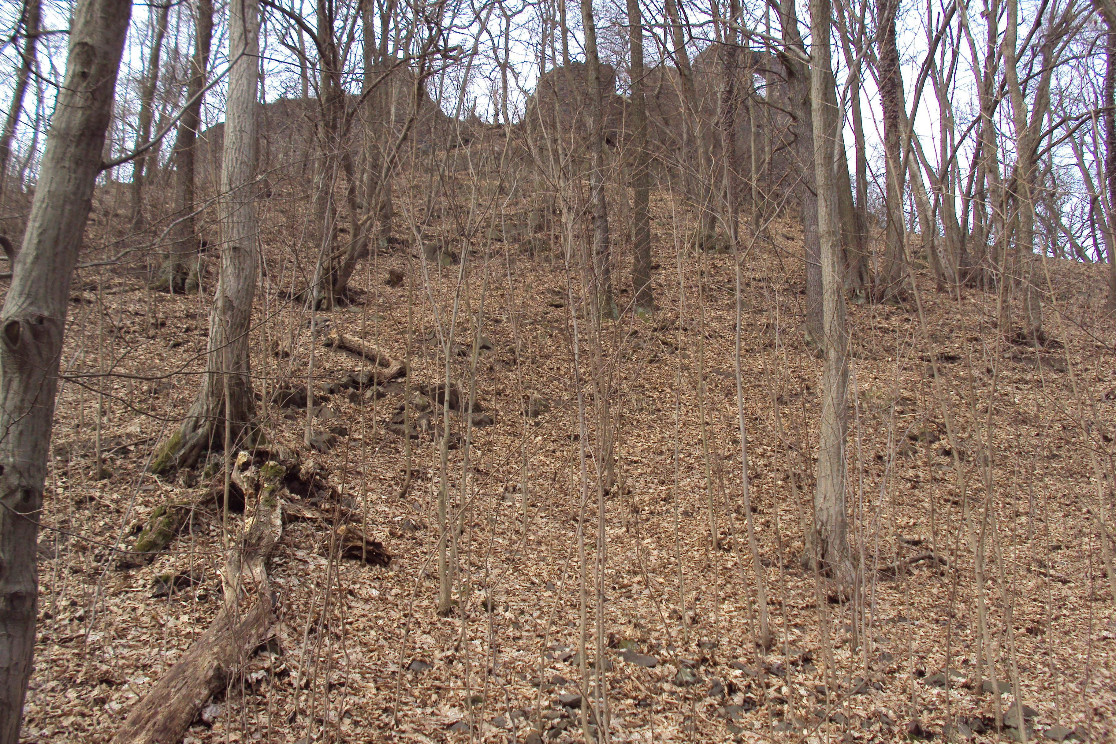 Pohled na nedaleký hrad z vrcholové csty